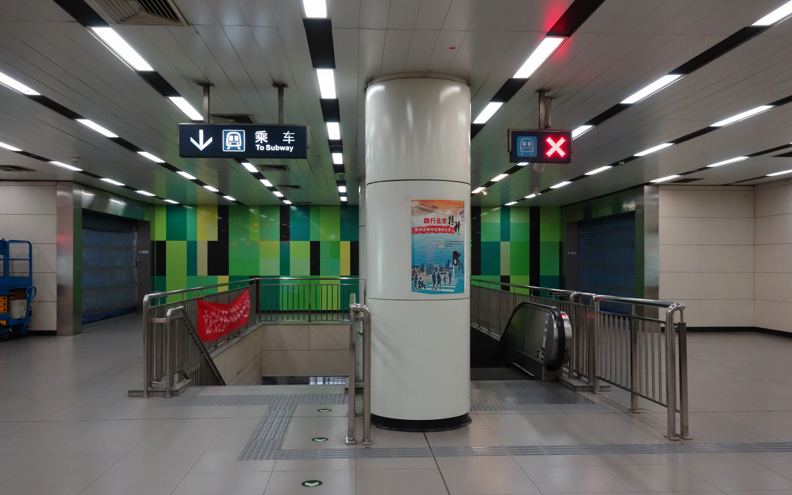 北京地铁10号线太阳宫站的分离式站厅